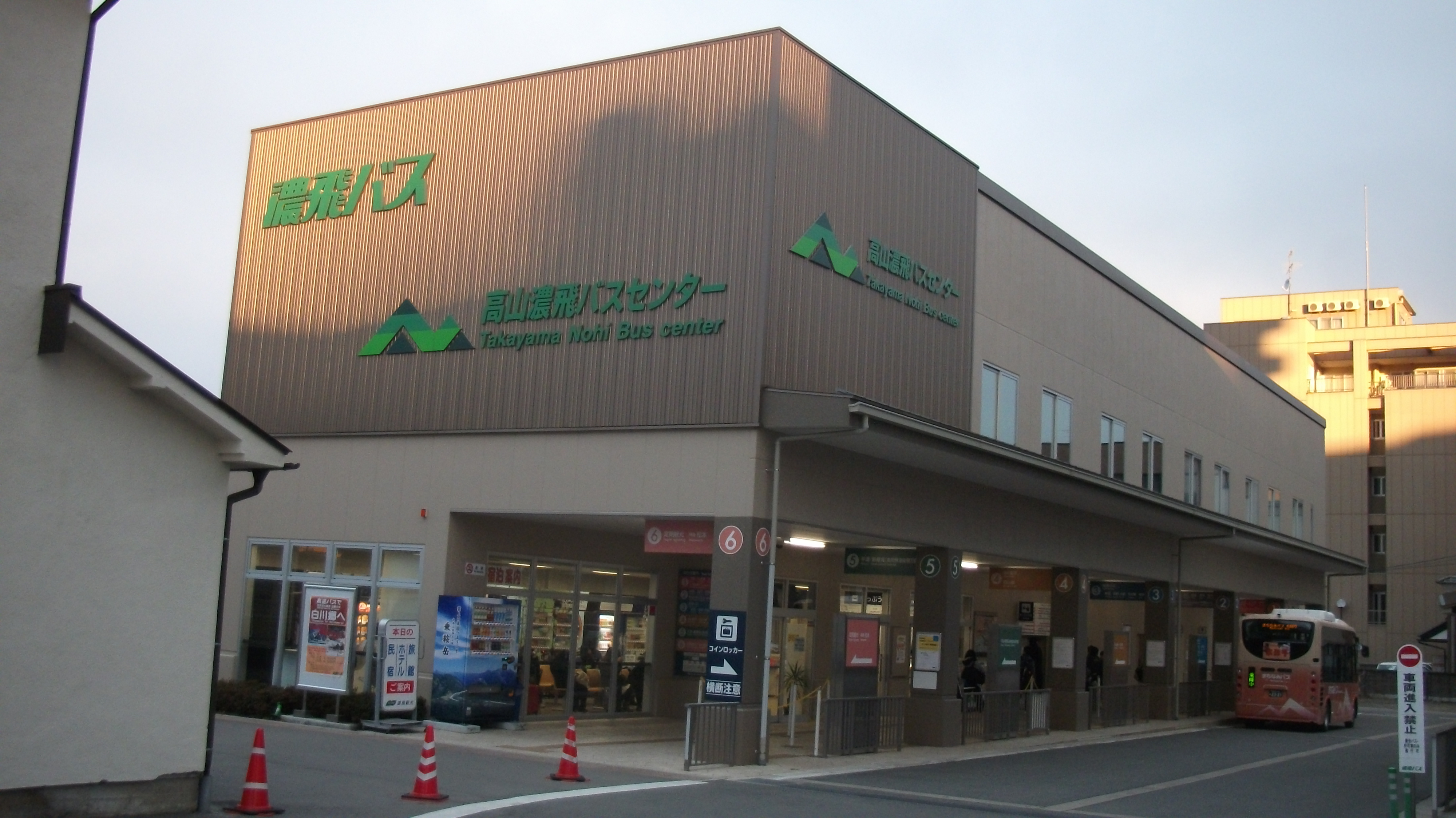 岐阜県高山市 高山濃飛バスセンター